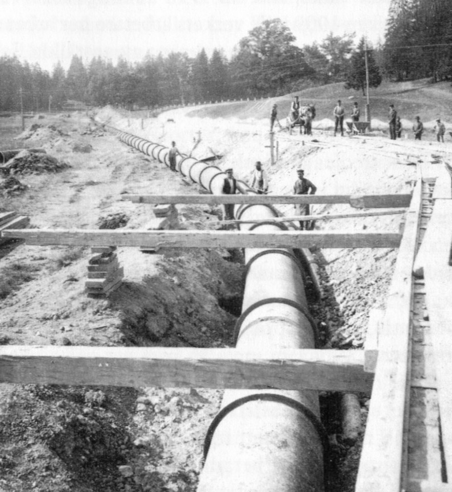 Huvudgasledning med en diameter på 90cm läggs ut vid Värtan, Norra Djurgården